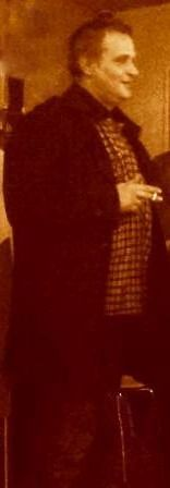 Поэт Петрушкин